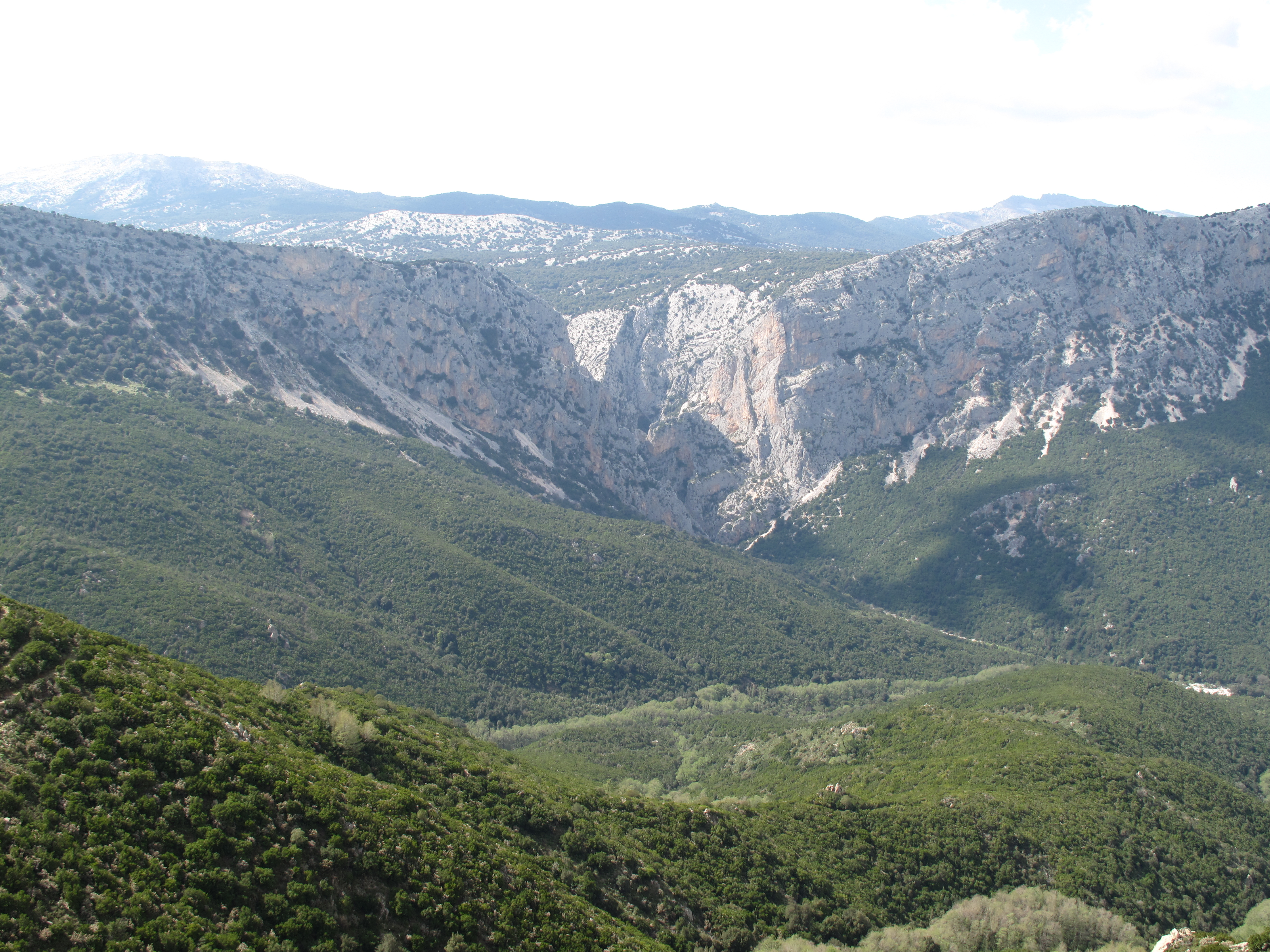 Le gole del Gorroppu viste dalla statale 125